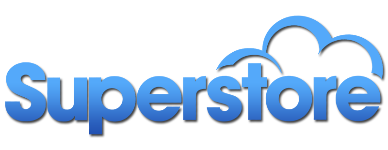 Logo della serie televisiva Superstore